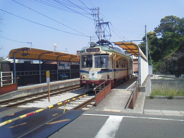 葛島橋東詰停留所全景